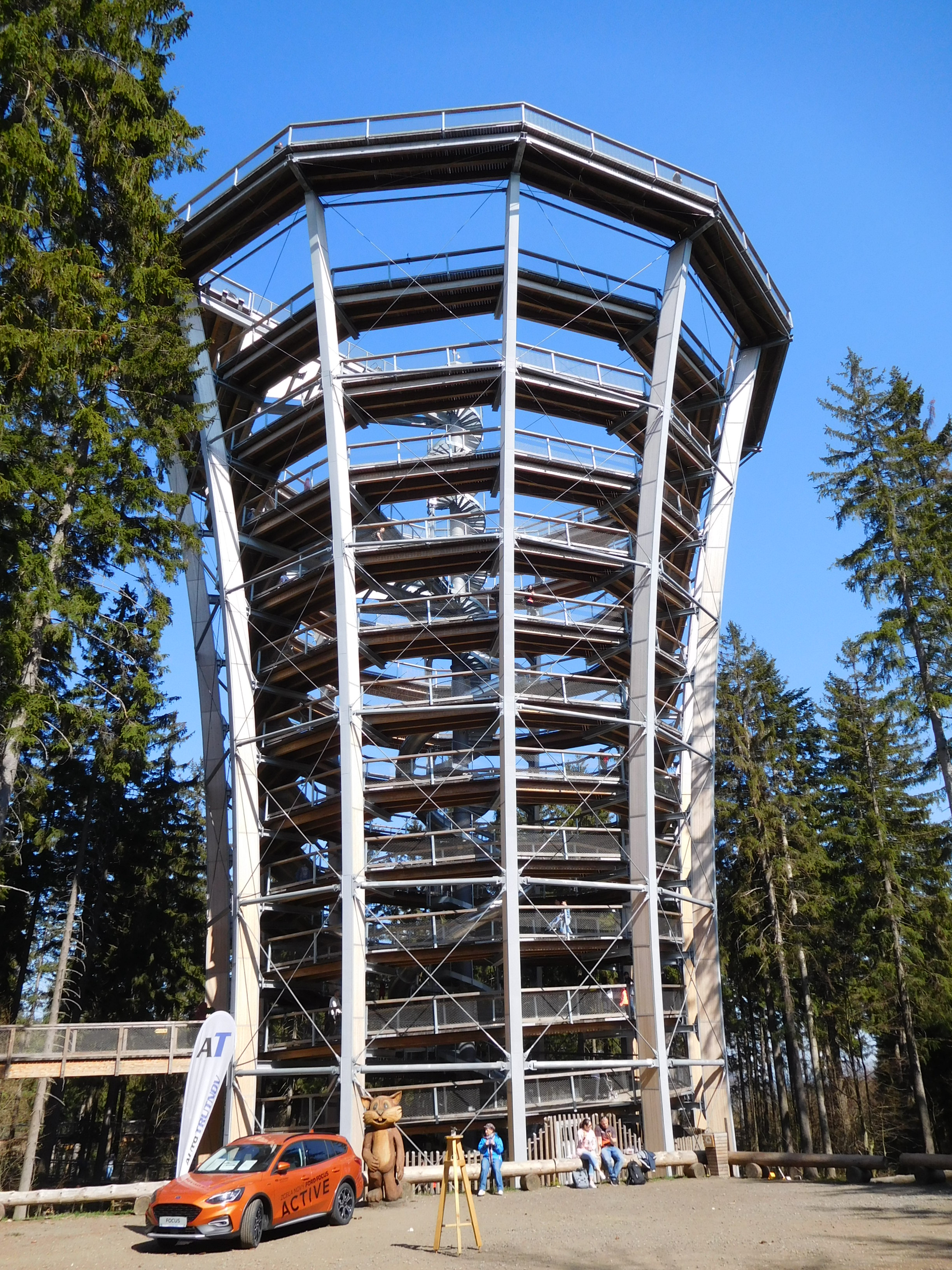 Janské Lázně - Stezka korunami stromů, rozhledna